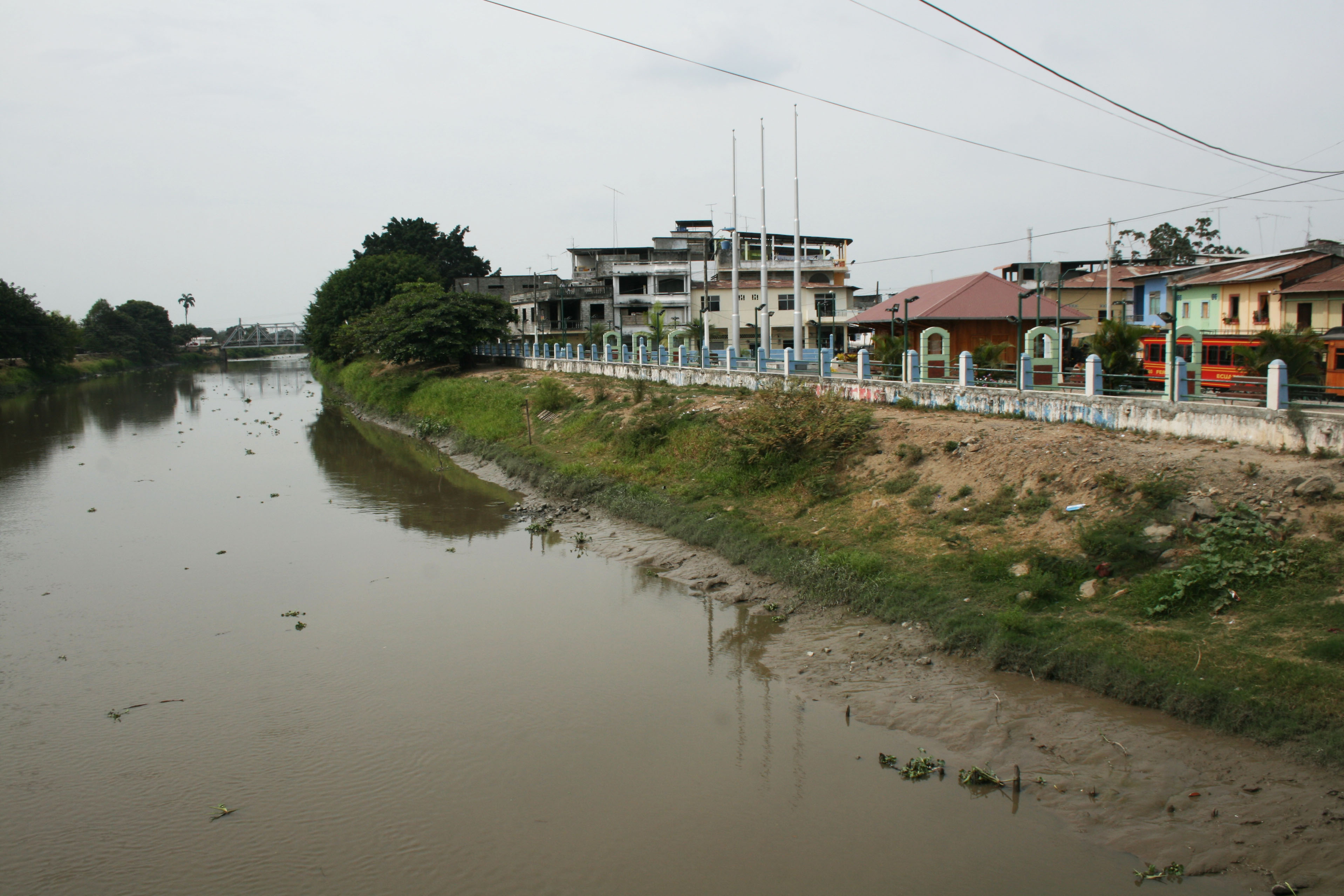 Río Yaguachi. Foto por: María Fernanda Landin.